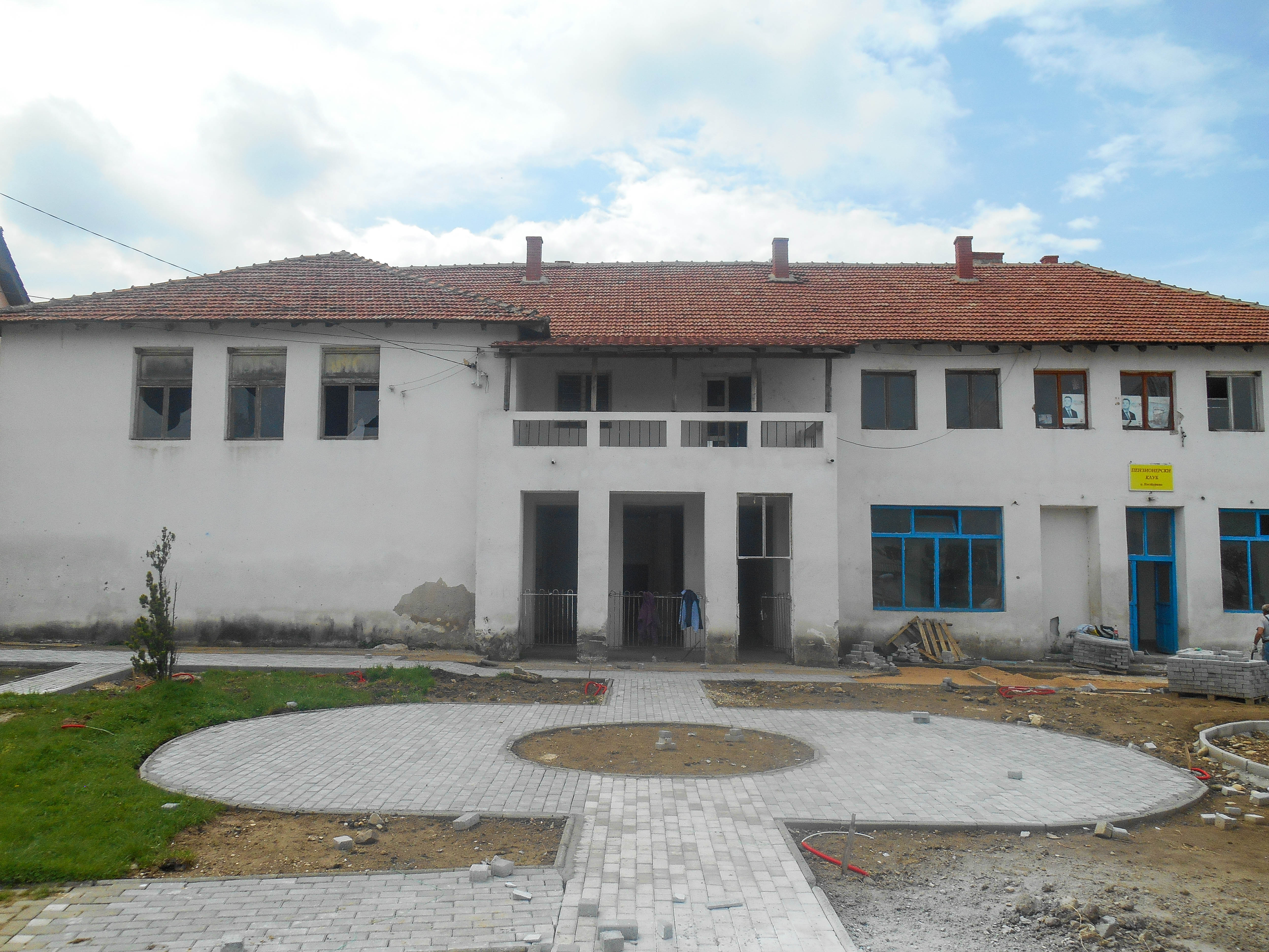 Дом на култура